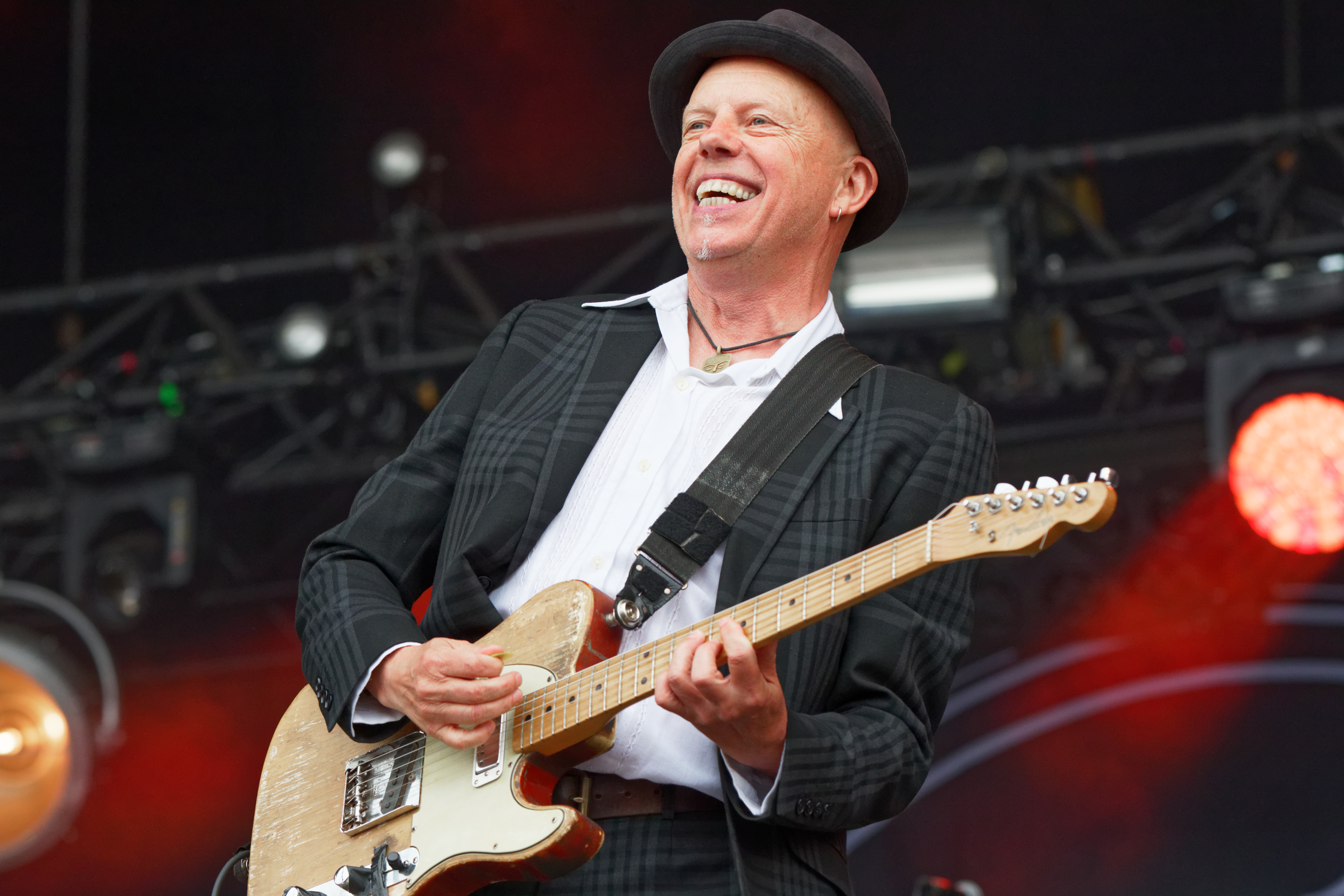 The Celtic Social Club en concert lors du festival des vieilles charrues 2017.